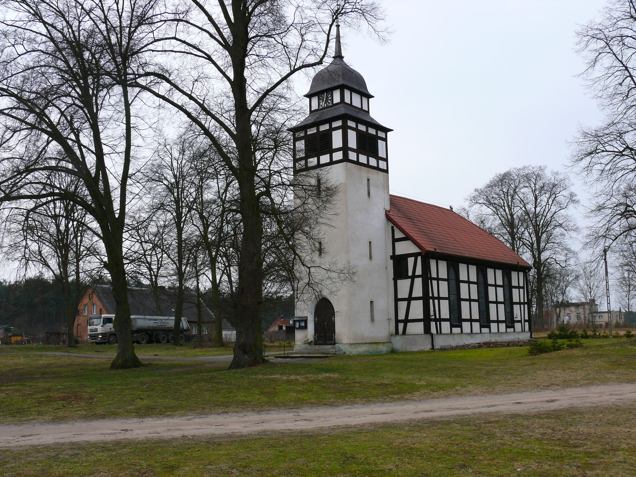 Kościół w Piotrowie (zabytek nr rejestr. 770/A)